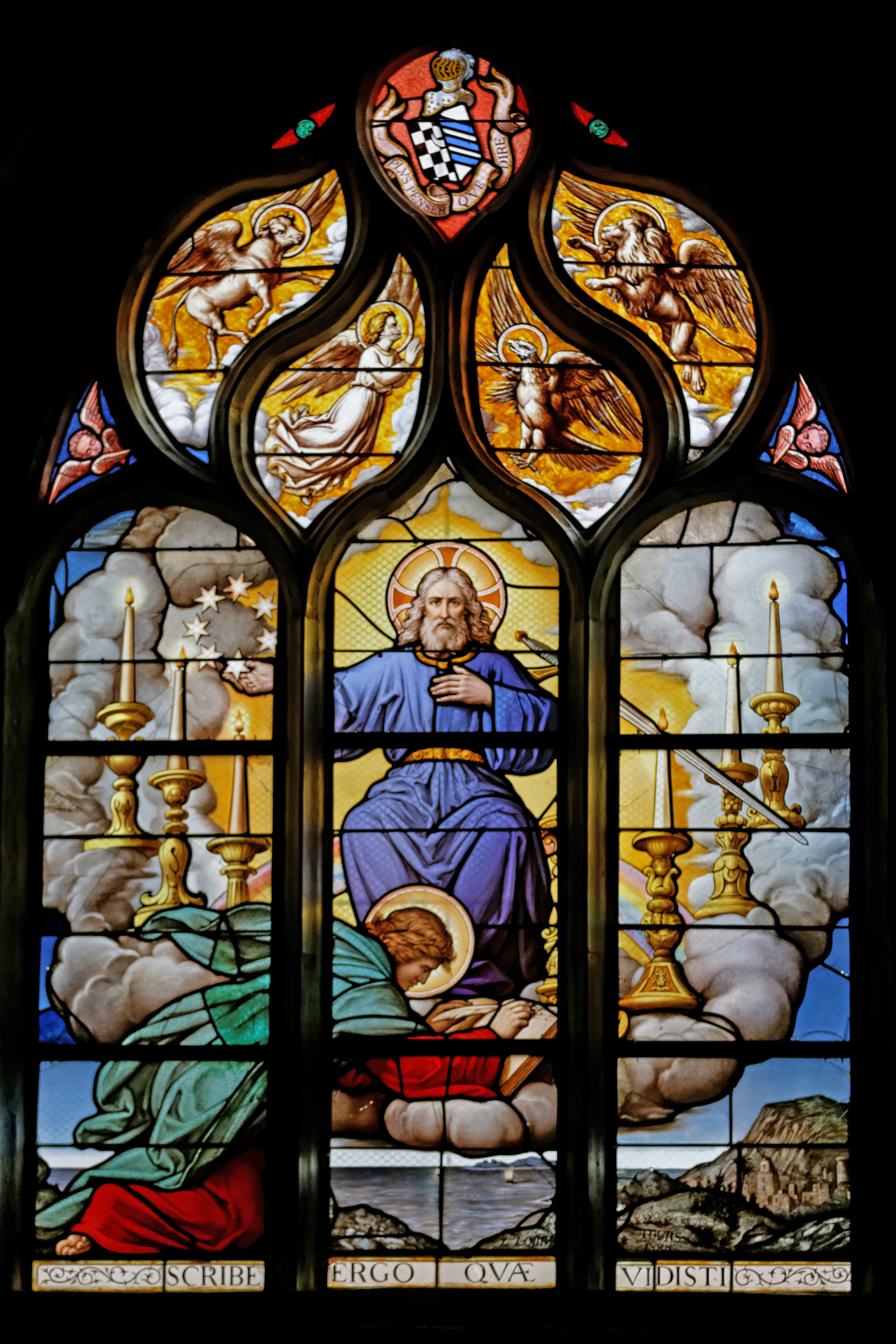 Vitrail de Lobin (Tours) daté de 1888 et représentant Saint Jean à Patmos (vision inaugurale de l'Apocalypse) dans la cathédrale Saint-Paul-Aurélien de Saint-Pol-de-Léon.